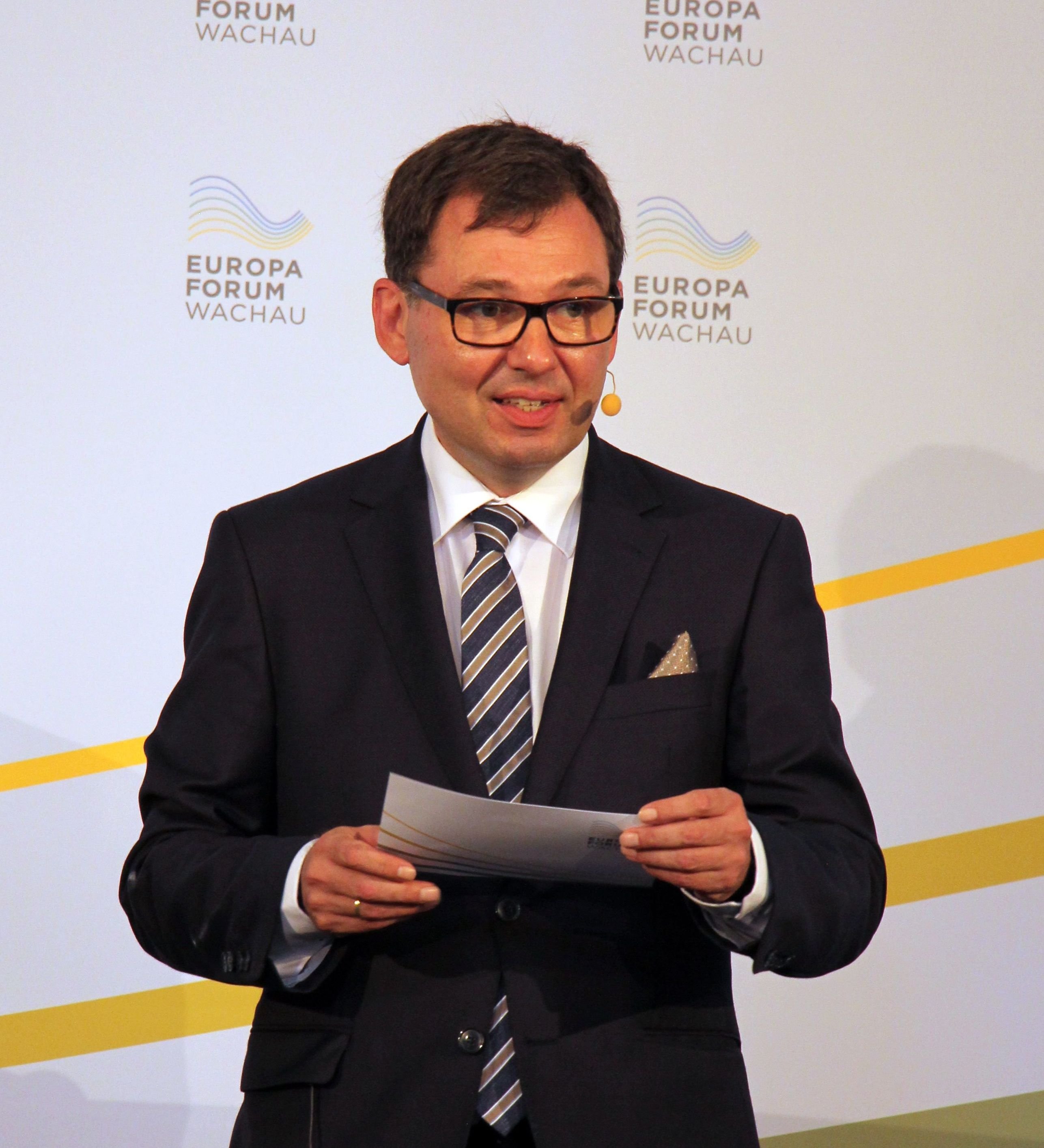 Europaforum Wachau 2019 auf Stift Göttweig